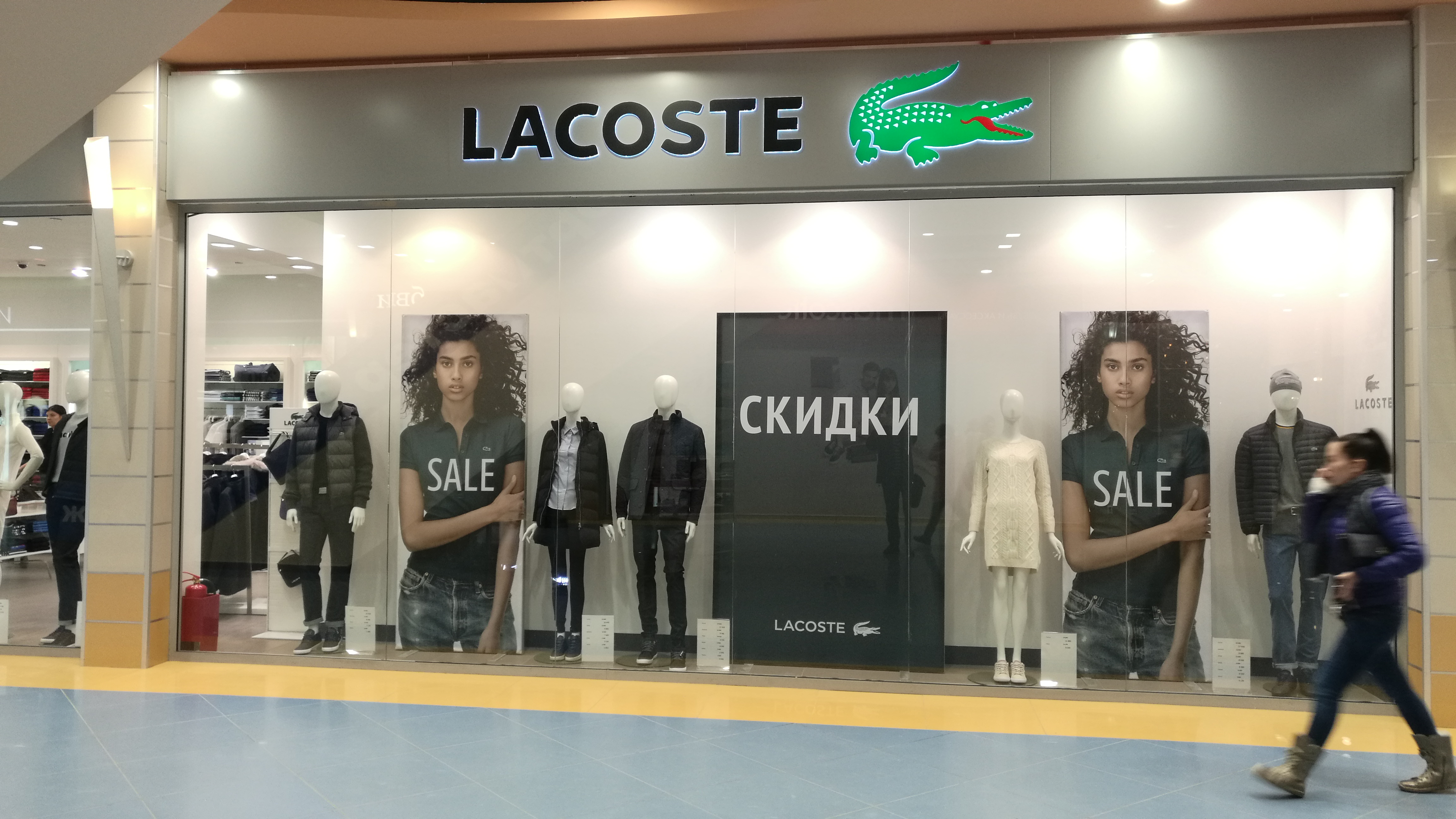 Butiko de Lacosta en aĉetcentro Goodwin. Tjumeno, Rusio.